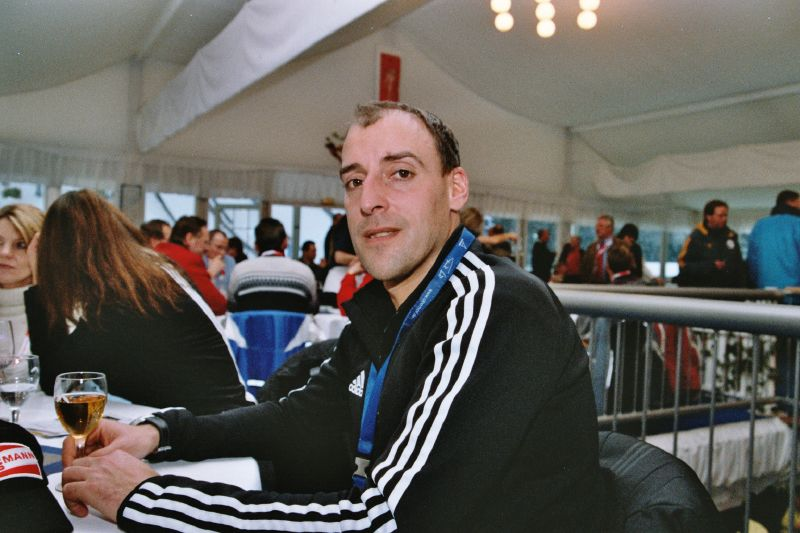 Frank Luck, deutscher Biathlet, macht mal Pause.